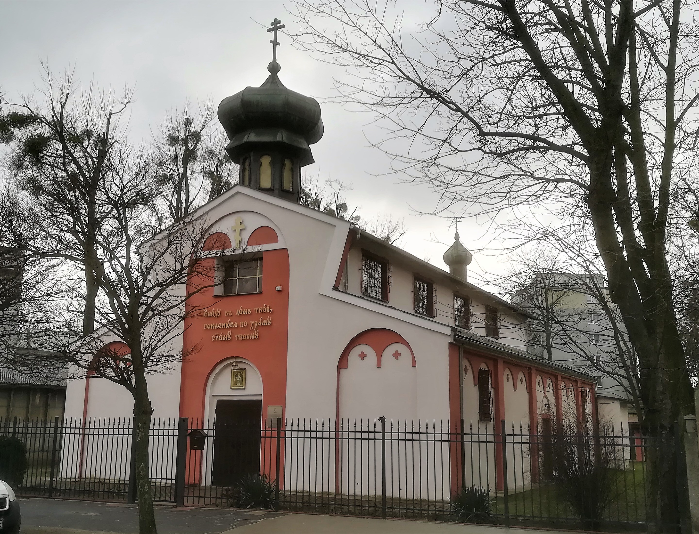 Cerkiew przy ul. Marcelińskiej w Poznaniu.